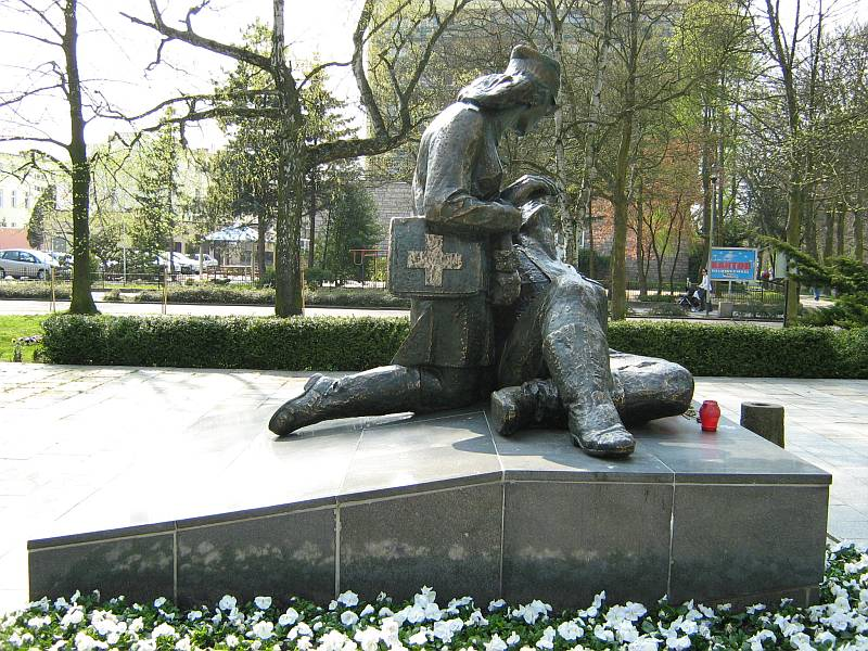 Pomnik Sanitariuszki w Kołobrzegu. Widok od strony wschodniej.